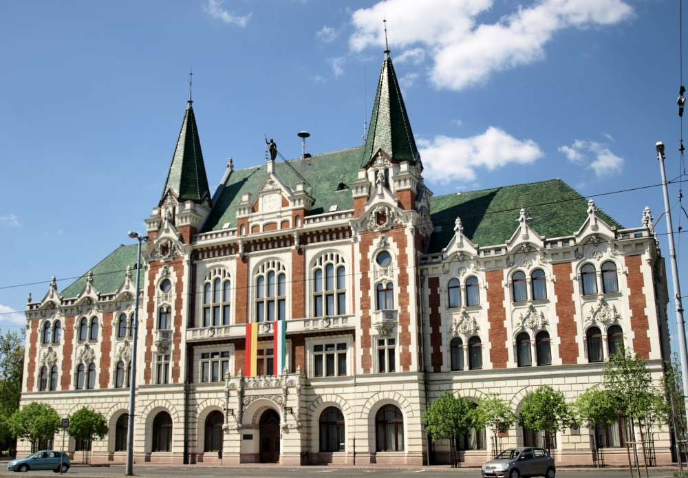 Újpest, városháza. Épült Böhm Henrik és Hegedűs Ármin tervei alapján 1899-ben (Budapest, IV.ker, István út 14.)